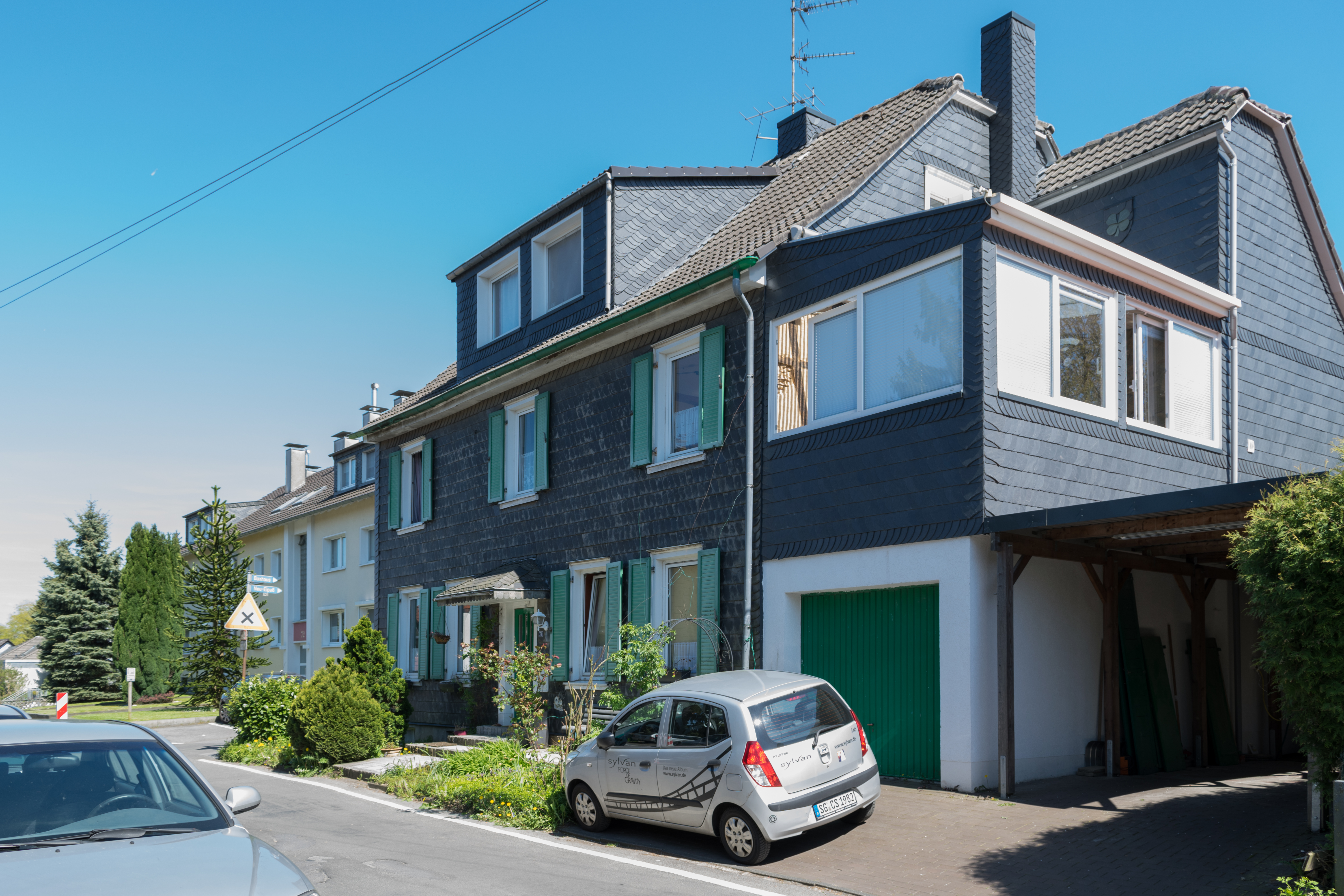 Eipaßstraße, Solingen